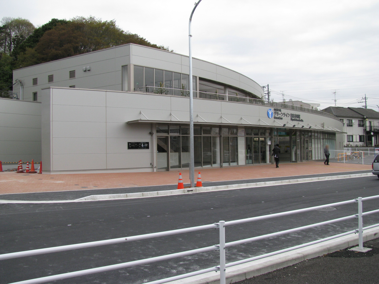 横浜市営地下鉄グリーンライン日吉本町駅